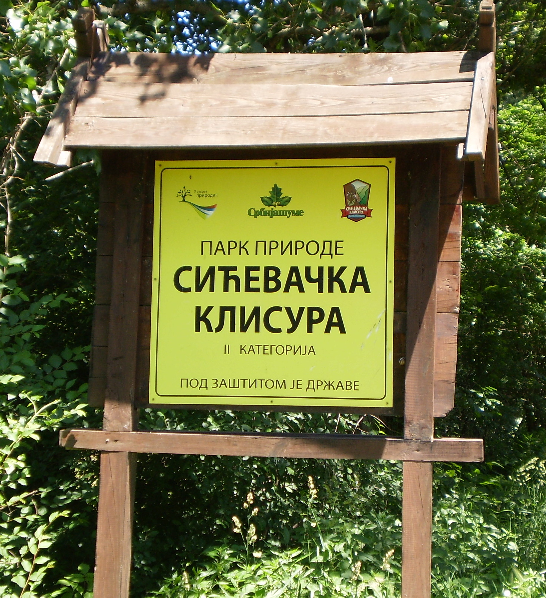 Statusna tabla na ulazu u Park prirode Sićevačka klisura. 3.6.2012